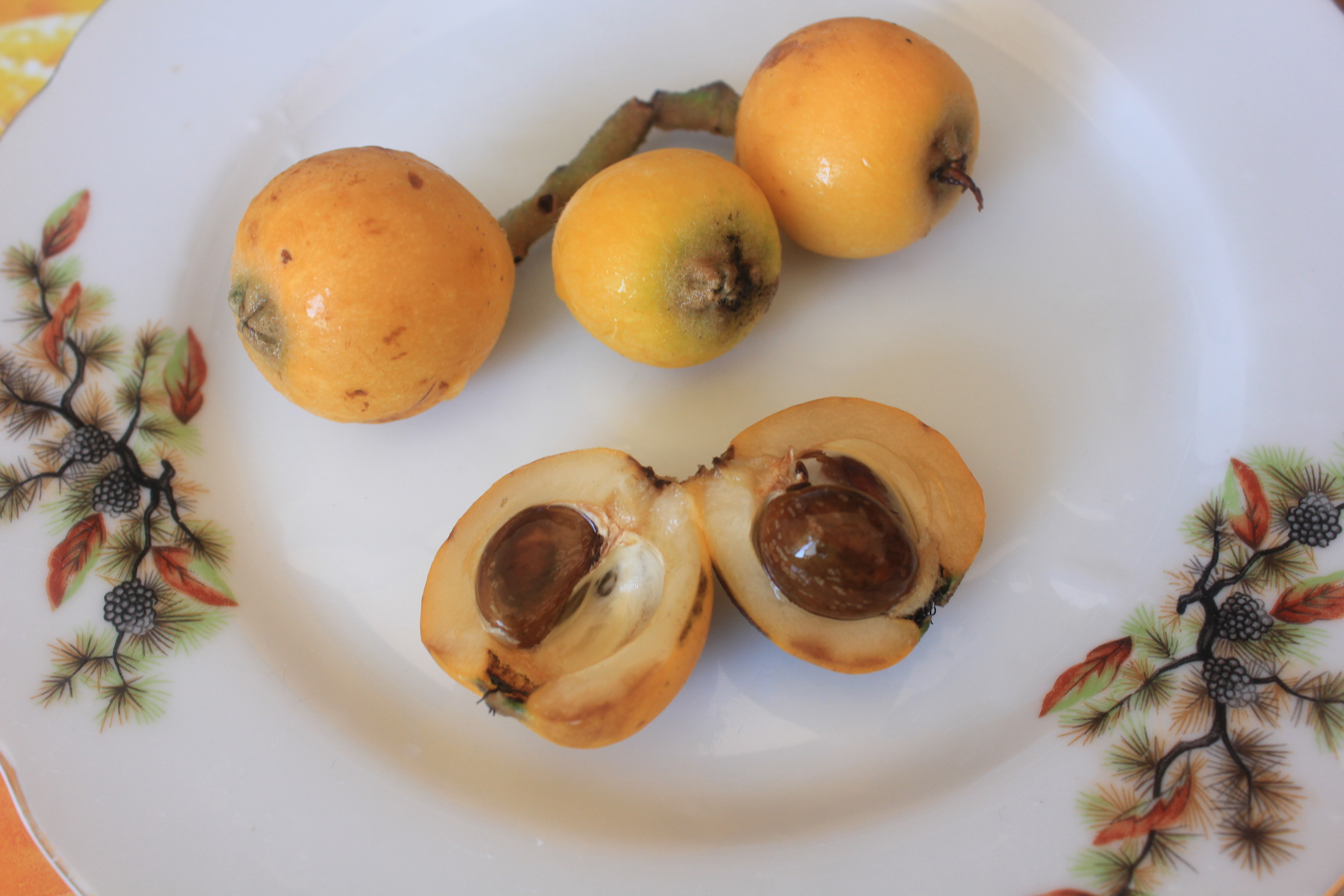 Мушмула, плоды. Сочи, июнь 2012 г.